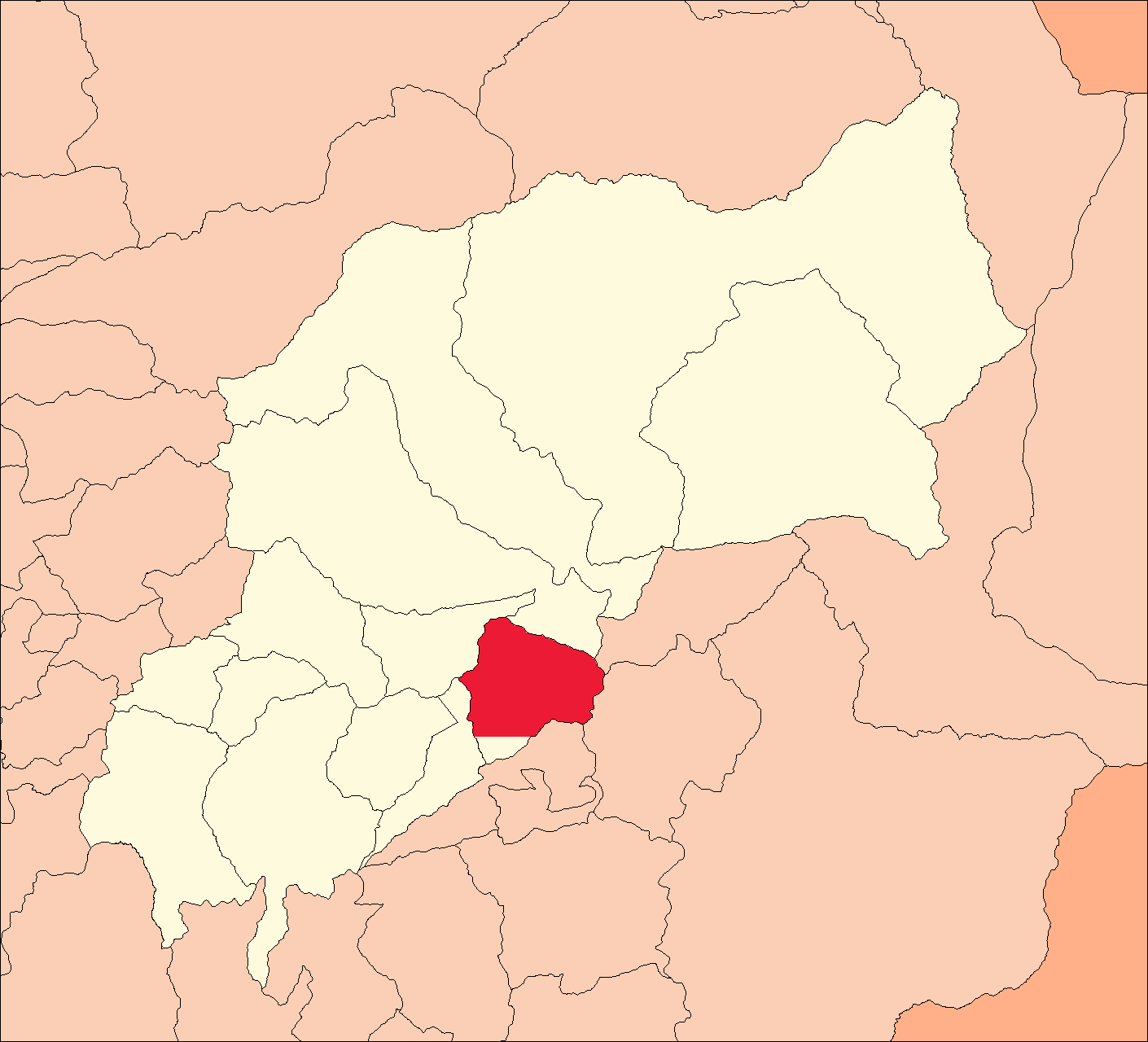 Área del distrito de Amarilis.